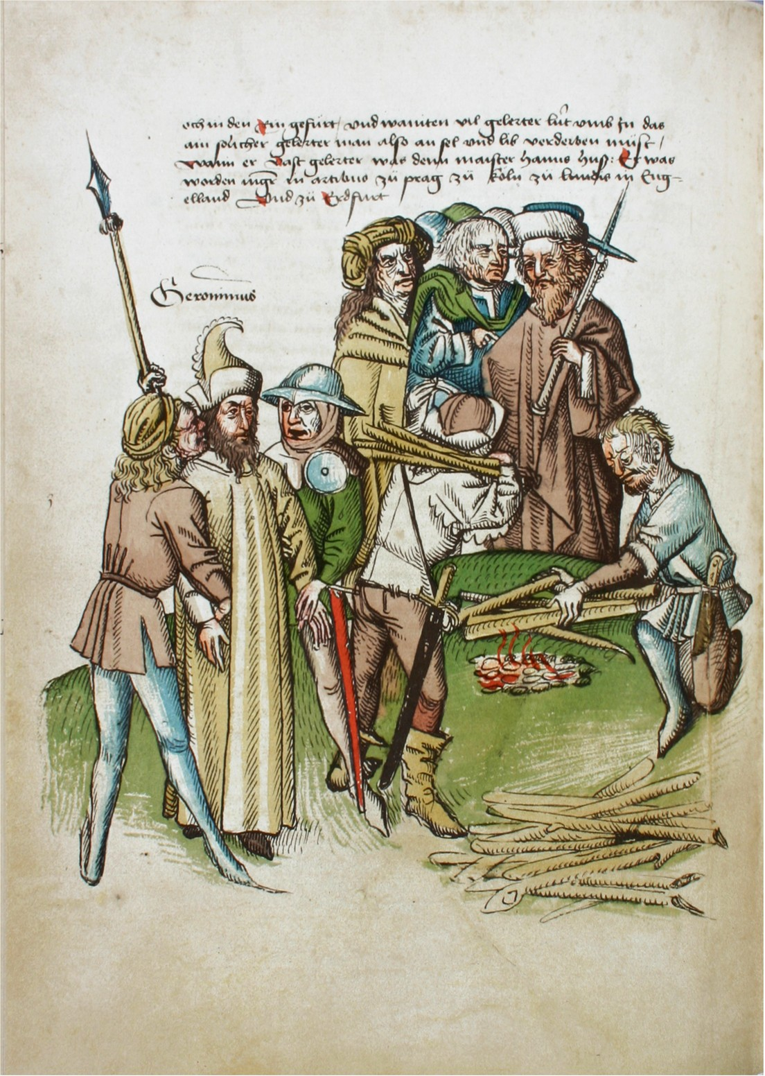 Rosgartenmuseum Konstanz, Hs. 1, Richental: Konzilschronik. In: Feger, Otto (Bearb.): Ulrich Richental: Das Konzil zu Konstanz. Faksimile. Starnberg - Konstanz 1964. Fol. 59v